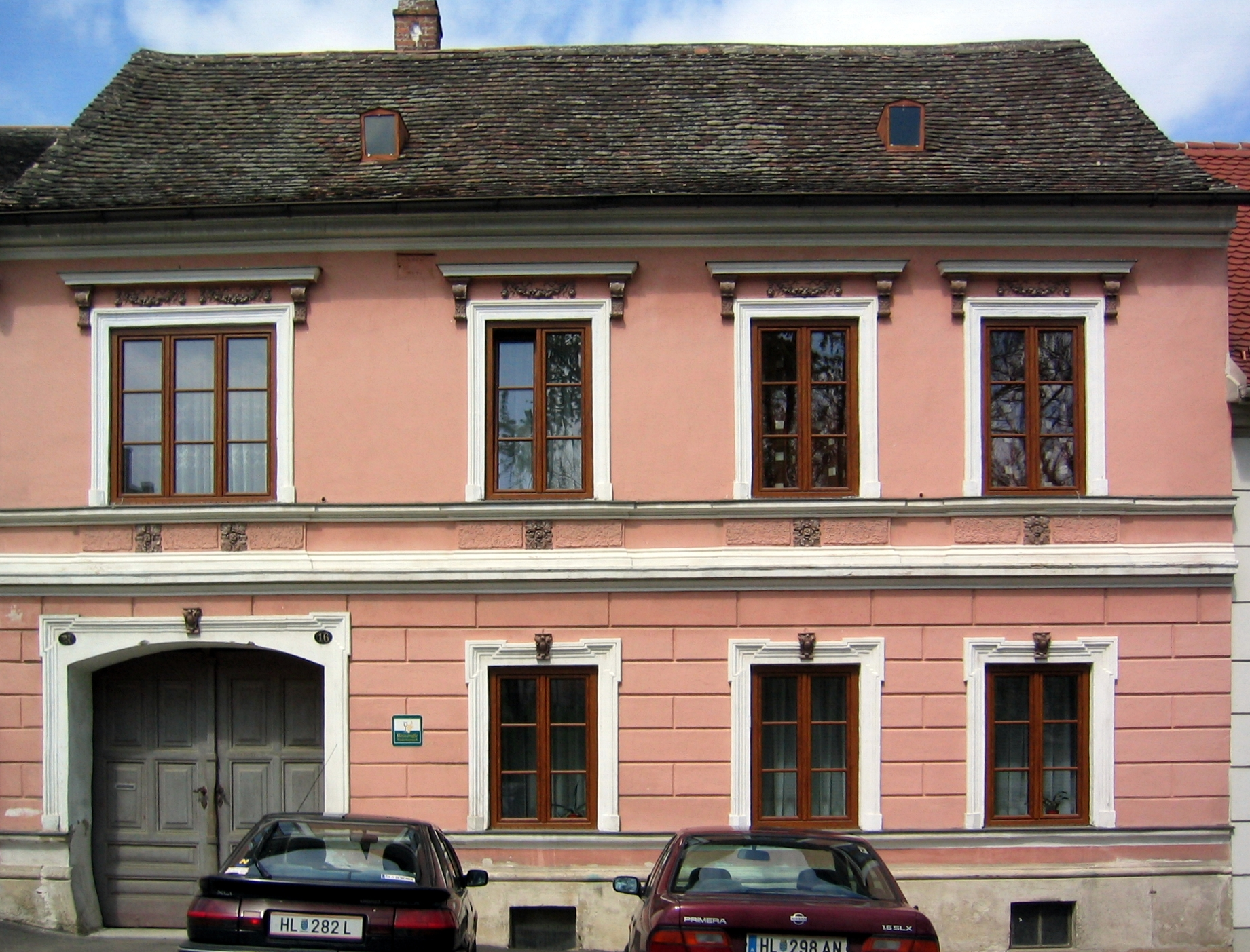 Sitzendorf Hauptplatz 16